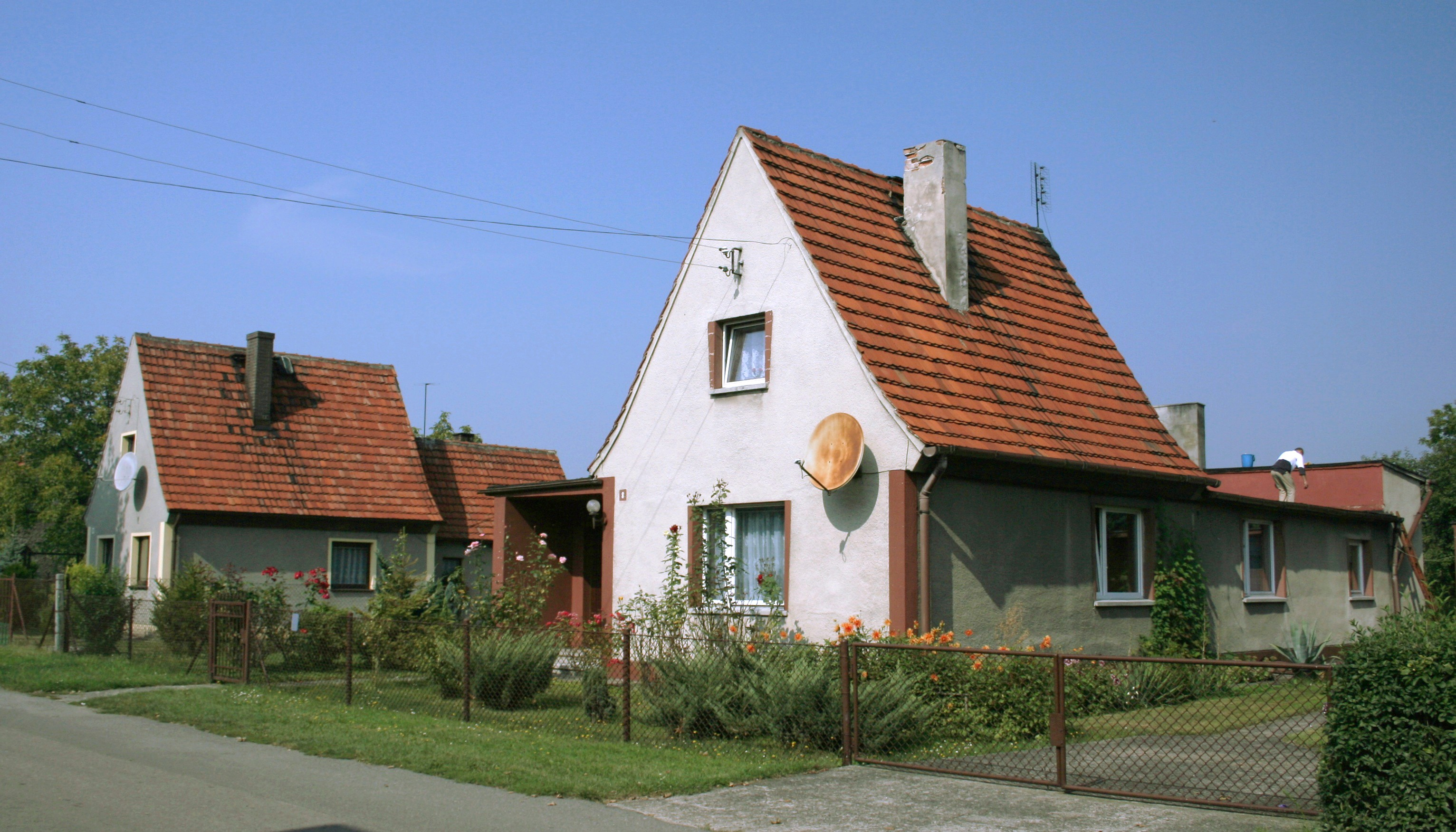 Budynki w Wilczym Gardle, dzielnicy Gliwic, woj. śląskie